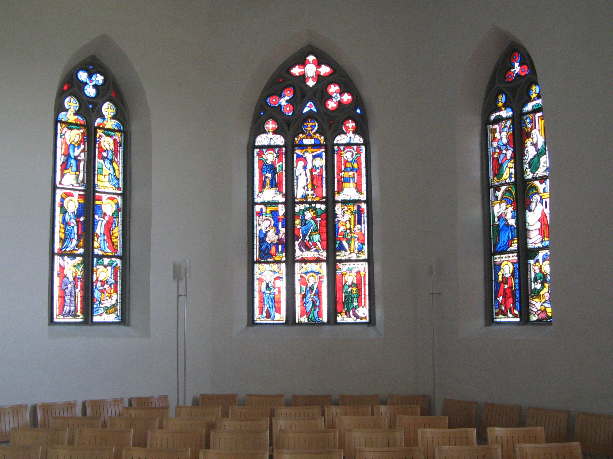 Glasfenster im Chor der Staufbergkirche (1435/1440)